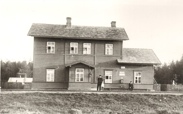 Kolu raudteejaama hoone This image on crowdsourcing geotagging platform Ajapaik